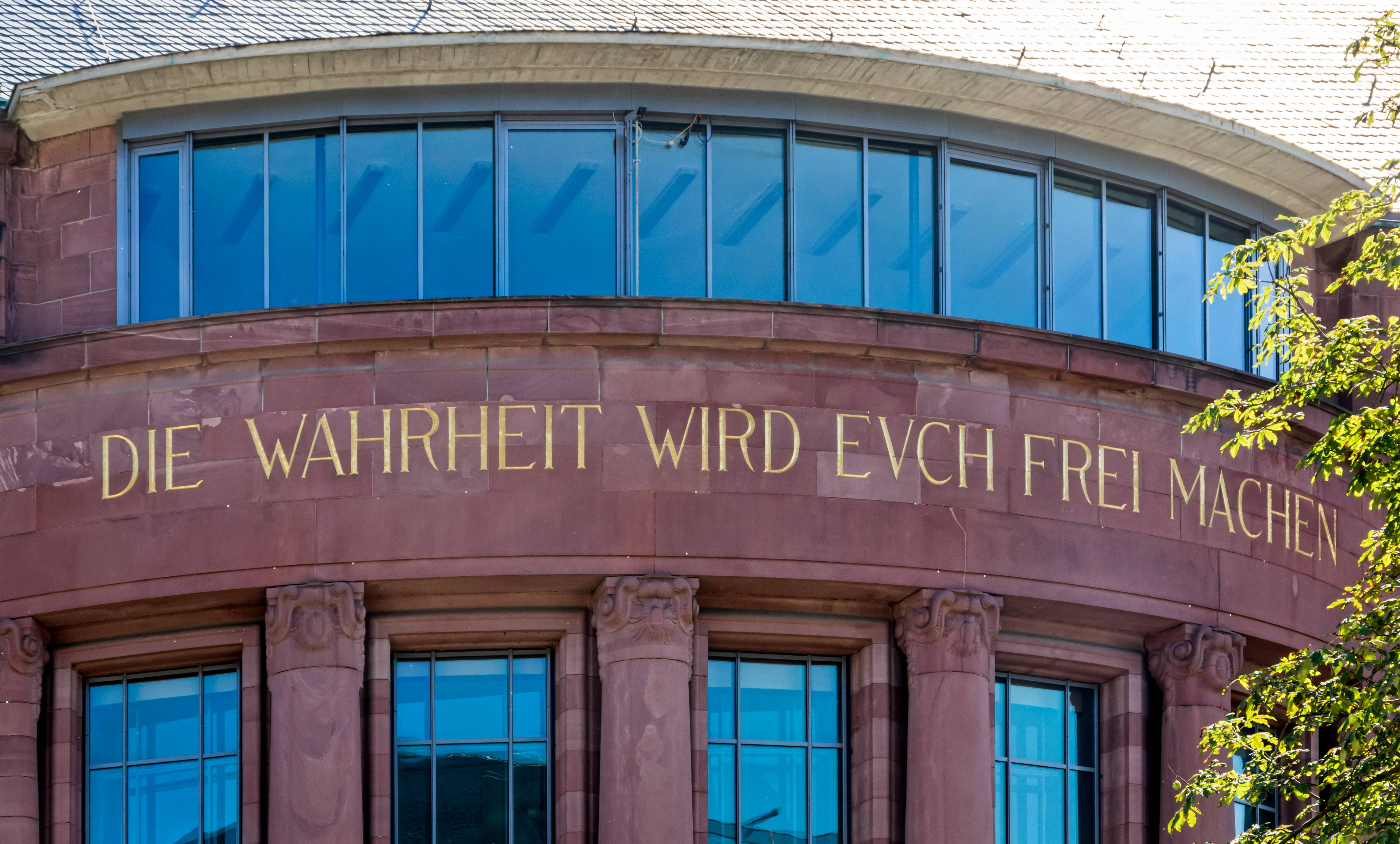 Der Schriftzug auf dem KG I der Uni Freiburg